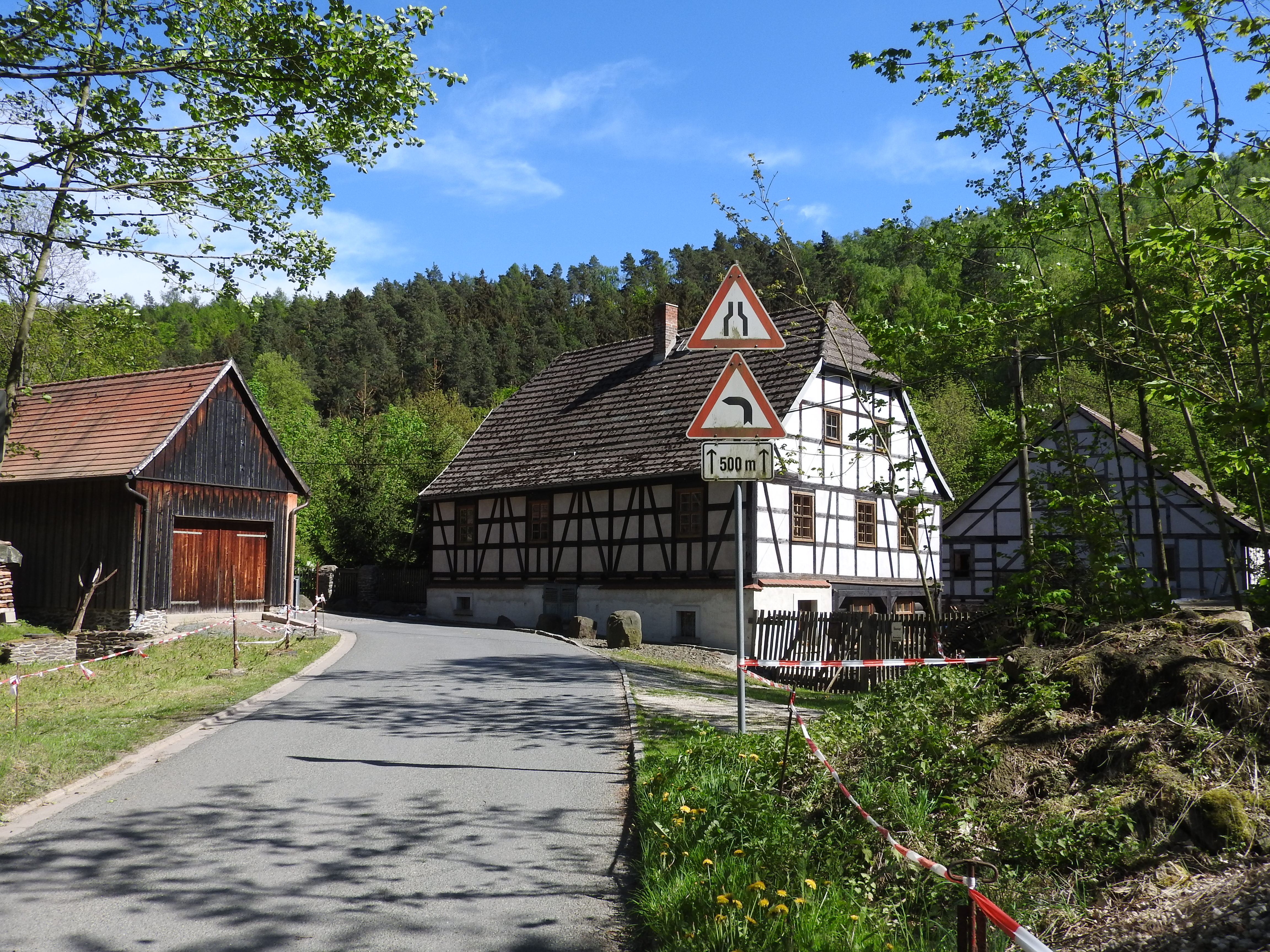 Eisenhammer Weida, Thüringen